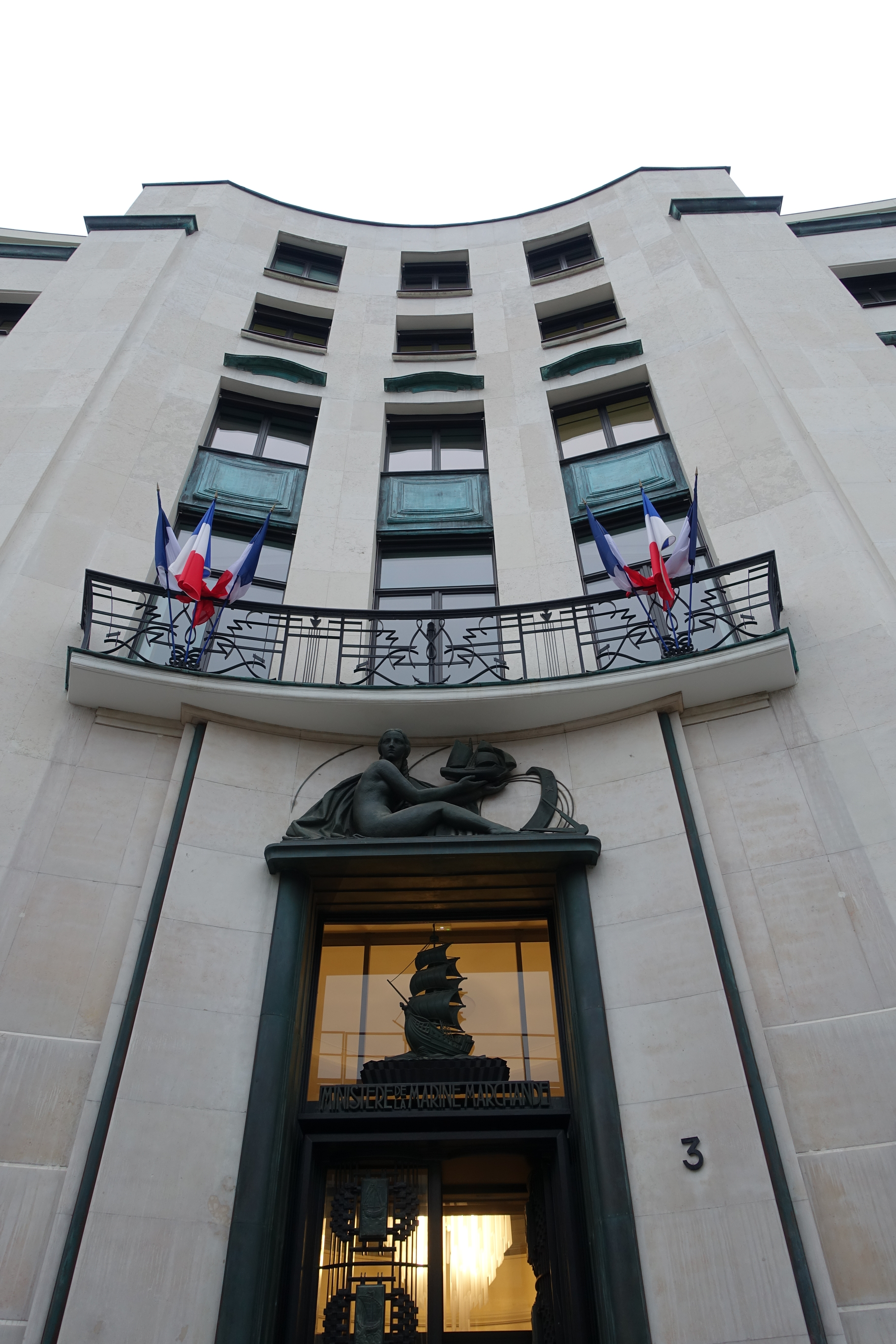 CNIL @ Ministère de la Marine Marchande @ Paris 7